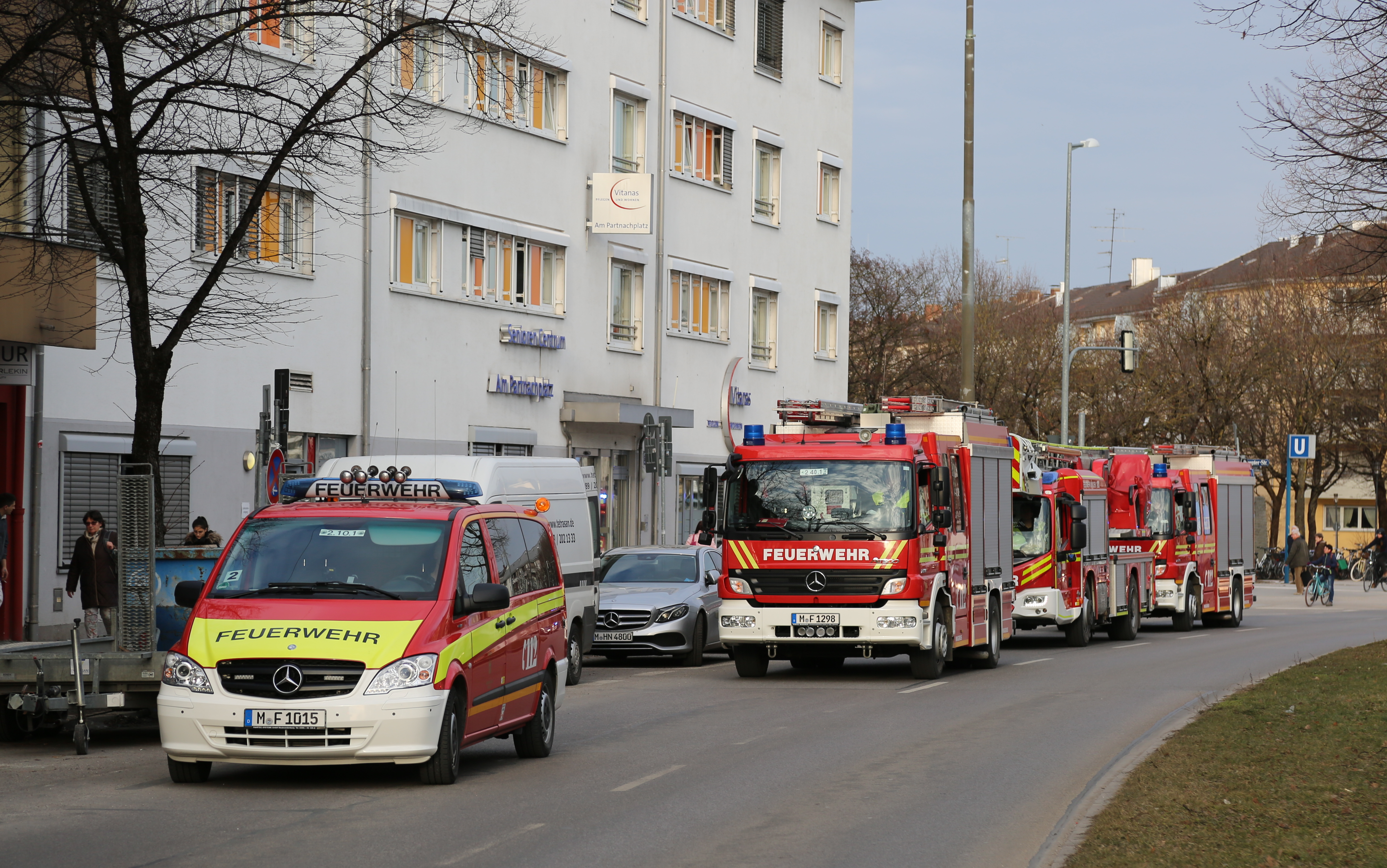 Löschzug 2 der Berufsfeuerwehr München bei einem Fehlalarm in Sendling-Westpark